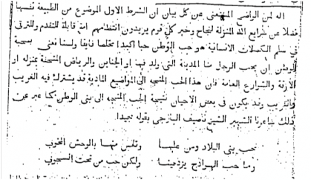 קטע הדן באהבת המולדת, מתוך: חדיקת אל אח'באר, גליון 173, אוגוסט 1861. מקור: פרומה זקס, "התגבשות התפיסה הסורית בכתבי משכילים במאות ה-19 וה-20" (חוברת הקורס, אוניברסיטת חיפה, תשע"ב), עמ' 7.